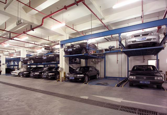 Lifto principo japoniška stovėjimo aikštelė pirmame namo aukšte.